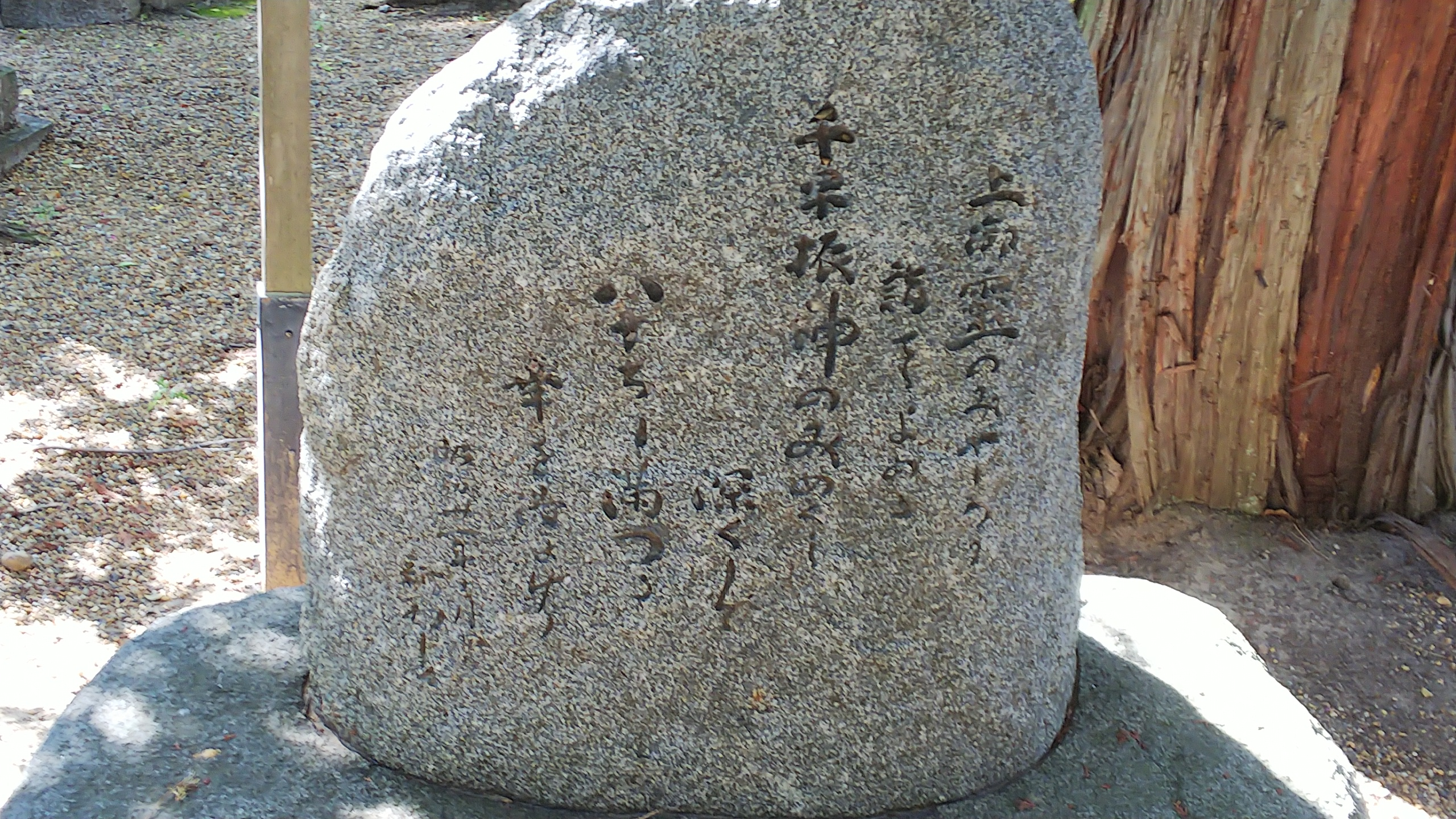 京都市上京区の上御霊神社にある「広辞苑」編者で有名な新村出の句碑